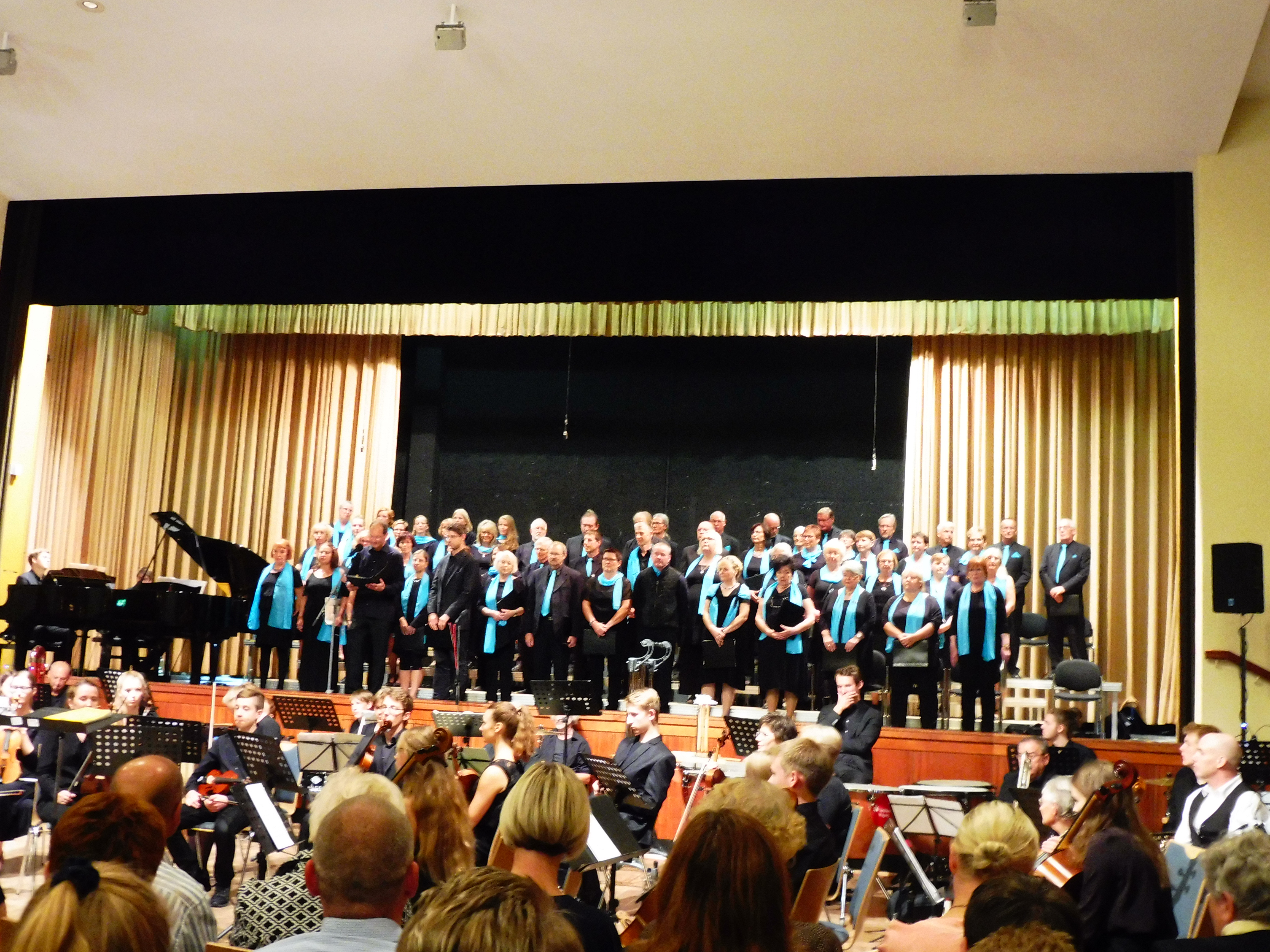 Chor Wilsnack Cantabile vor Beginn der Aufführung der Carmina Burana (Orff) in der Stadthalle Parchim, im Vordergrund Musiker des Symphonischen Orchesters der Kreismusikschule Prignitz [1].